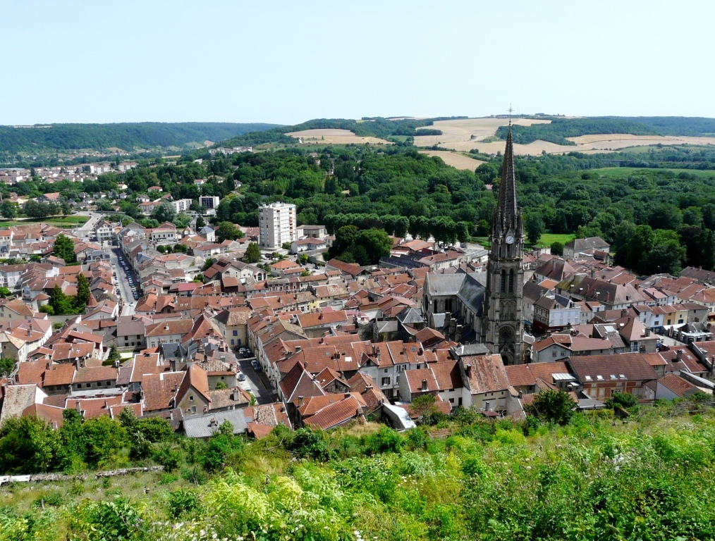 La vieille ville et ses faubourgs depuis la côte du château